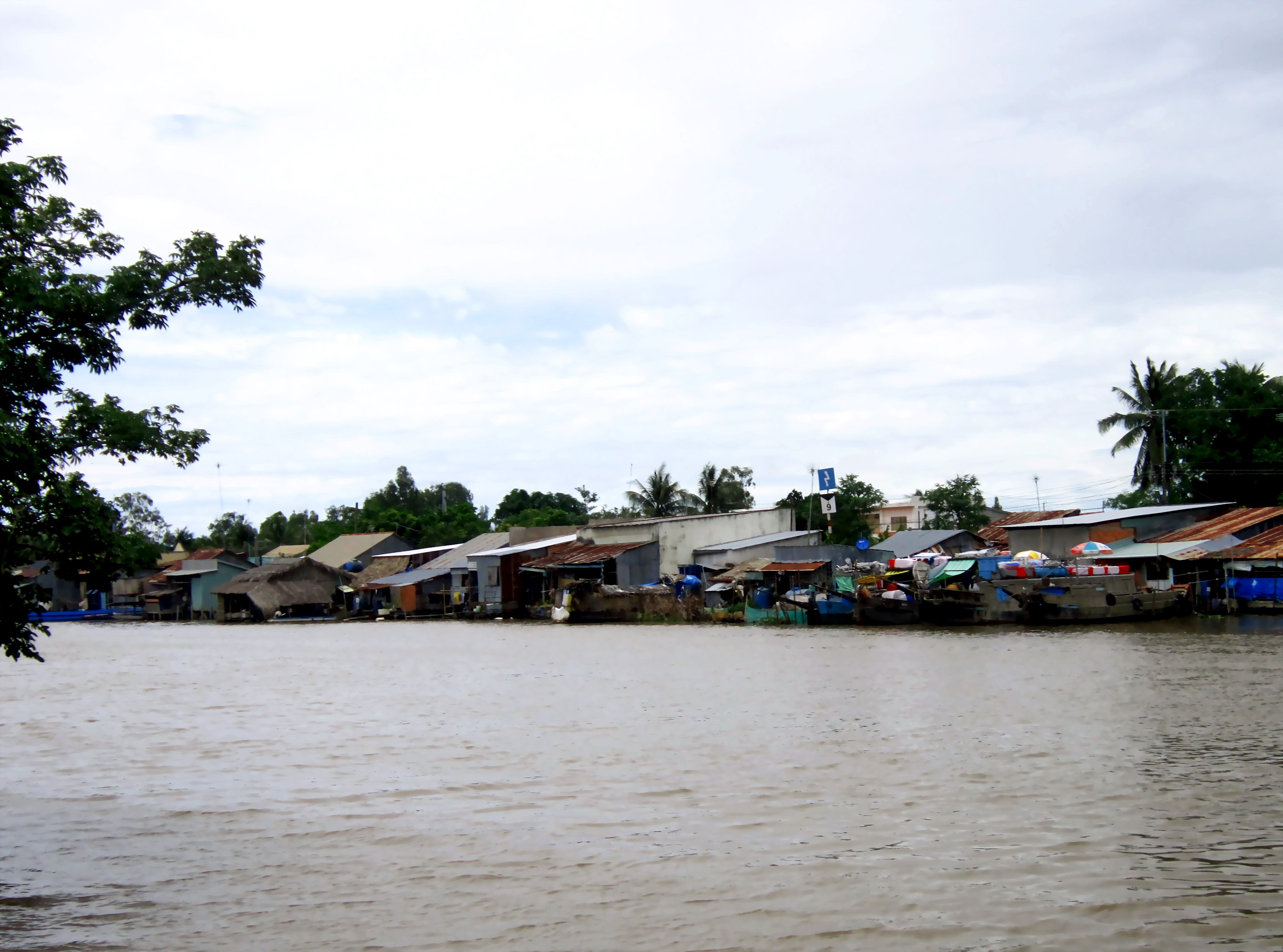 Bến tàu chở hàng ở xã Phi Thông (thuộc thành phố Rạch Giá, tỉnh Kiên Giang, Việt Nam) nơi bờ kênh Thoại Hà.